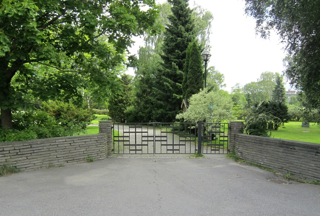 Vestre Fredrikstad gravlund